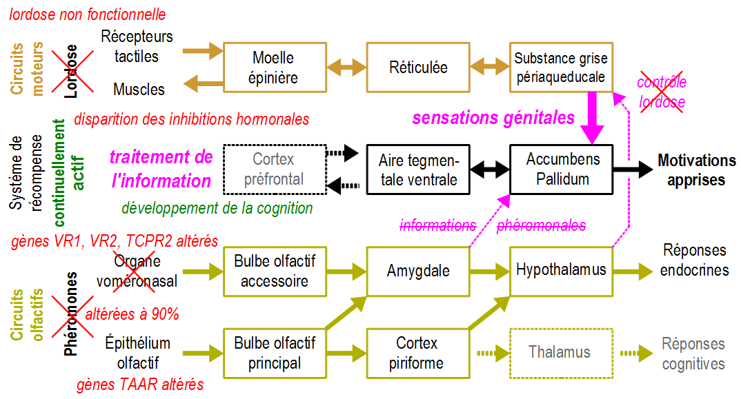 Description de l'évolution des principaux circuits neurobiologiques innés qui contrôlent l'apprentissage de la motivation sexuelle chez les mammifères femelles non-primates. Synthèse d'après : Kobayakawa K., Kobayakawa R., Matsumoto H. , Oka Y., Imai T., Ikawa M., Okabe M., Ikeda T., Itohara S., Kikusui T., Mori K., Sakano H. Innate versus learned odour processing in the mouse olfactory bulb. Nature, 450(7169):503-508, 2007 ; Novejarque A., Gutierrez-Castellanos N., Lanuza E., Martinez-Garcia F. Amygdaloid projections to the ventral striatum in mice: direct and indirect chemosensory inputs to the brain reward system. Front Neuroanat., 5:54, 2011 ; Nei M., Niimura Y., Nozawa M. The evolution of animal chemosensory receptor gene repertoires: roles of chance and necessity. Nat. Rev. Genet., 9(12):951-963, 2008 ; Zhang J., Webb D.M. Evolutionary deterioration of the vomeronasal pheromone transduction pathway in catarrhine primates. Proceedings of the National Academy of Sciences of the United States of America, 100(14):8337-8341, 2003 ; Foster R.G., Roenneberg T. Human responses to the geophysical daily, annual and lunar cycles. Curr. Biol., 18(17):R784-R794, 2008 ; Furuichi T. Female contributions to the peaceful nature of bonobo society. Evolutionary Anthropology, 20(4):131-142, 2011. Wunsch S. Neurobiologie du désir et du plaisir. in Lopès P., Poudat F.-X. (Eds). Manuel de sexologie. Elsevier Masson, (3):37-50, 2013.